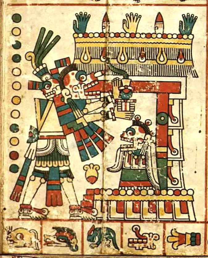 Mictlanteuctli descrit en el Codice Fejervary-Mayer